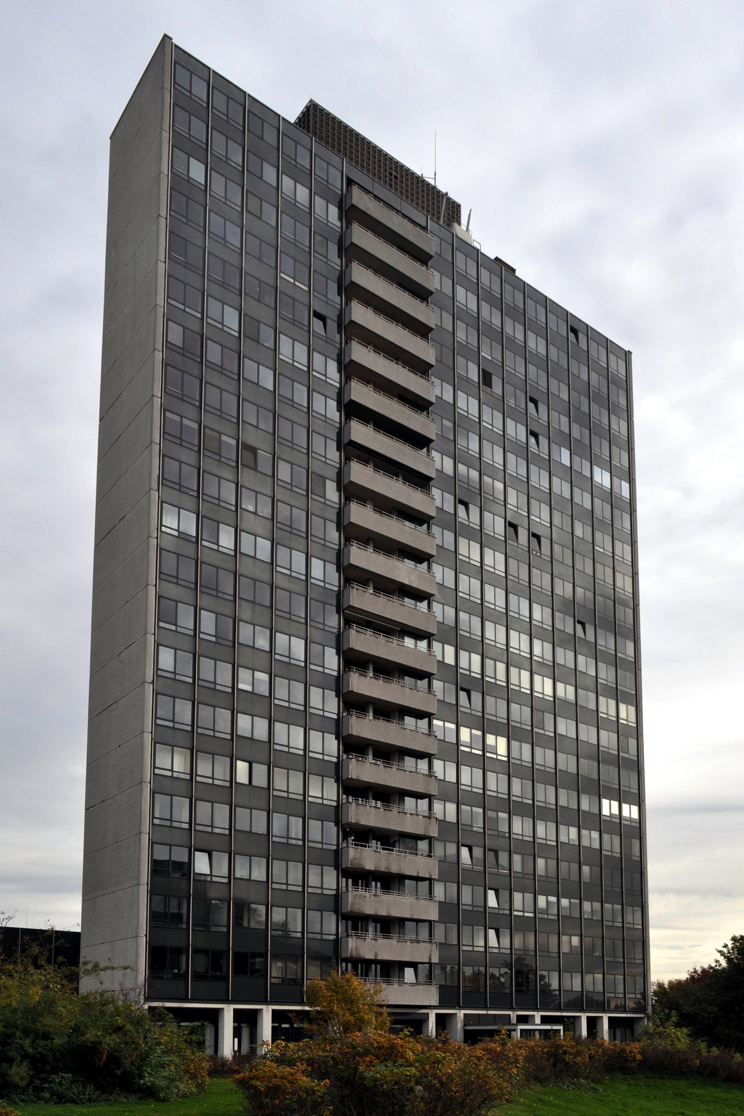 Palmaille 35 in Hamburg-Altona-Altstadt.